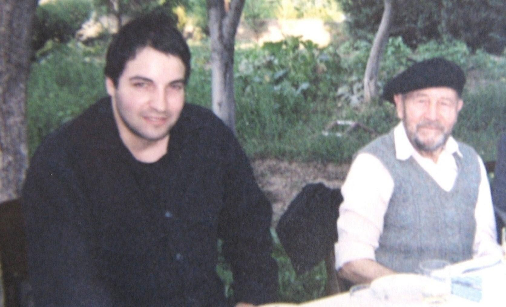 Крум Дерменджиев заедно със сина си Борис Дерменджиев.